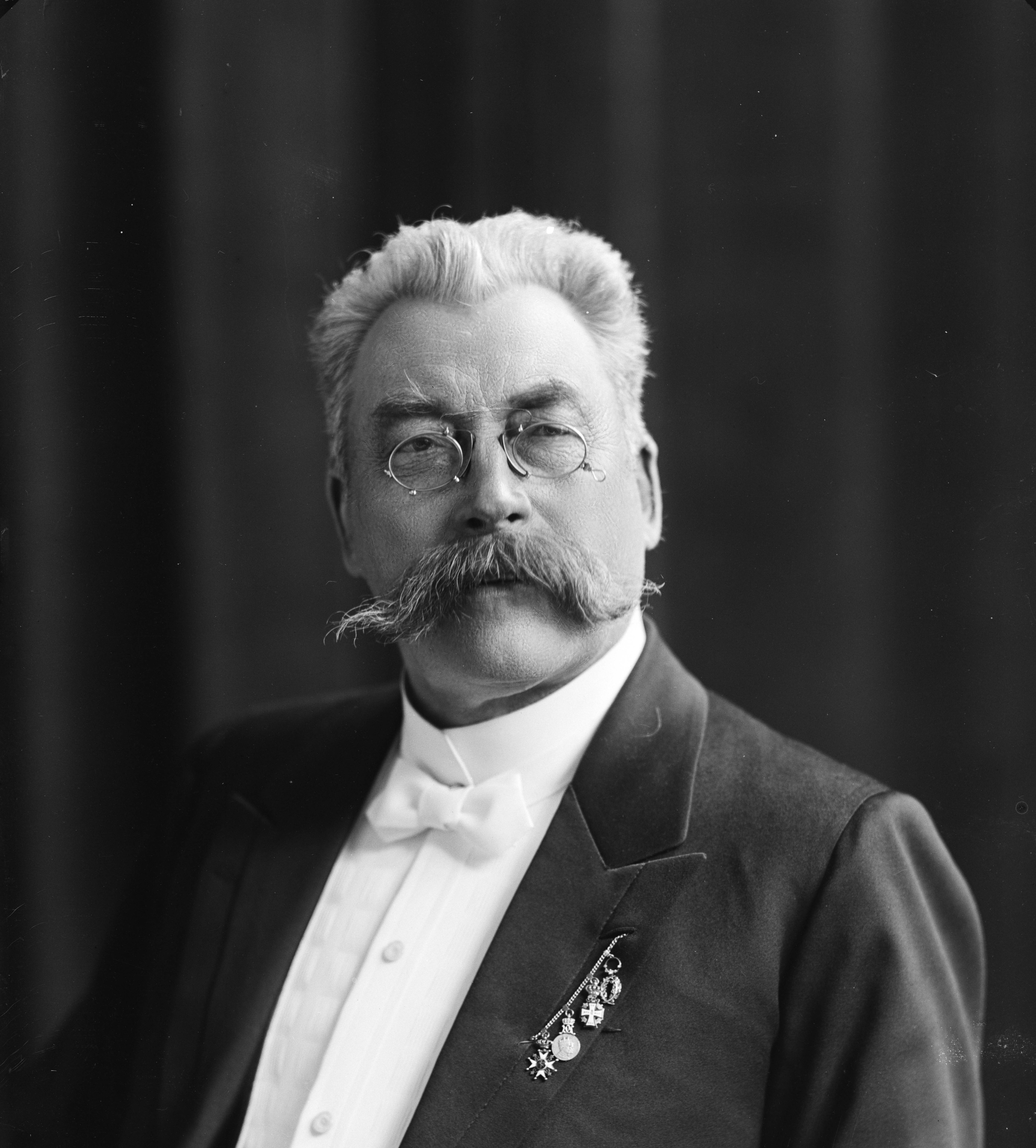 Adolf Øien, norsk industrimann, skipsreder og velgjører (1849–1918)